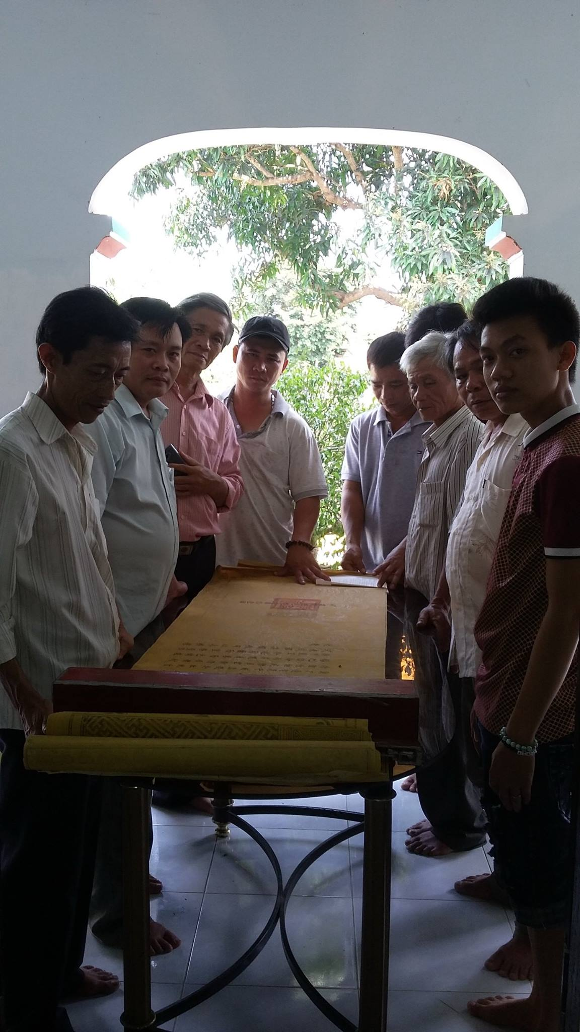 ảnh